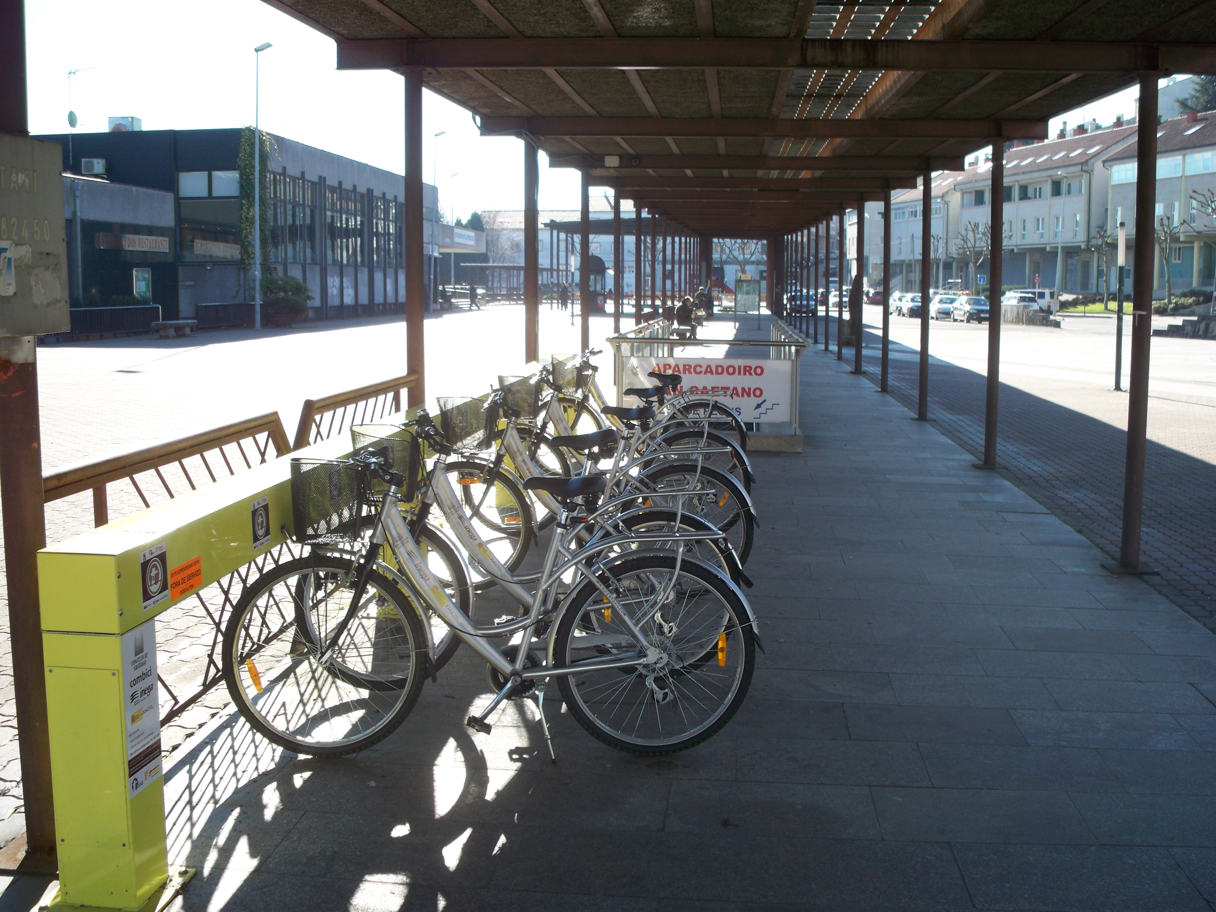 Servizo de alugueiro de bicis de Santiago de Compostela